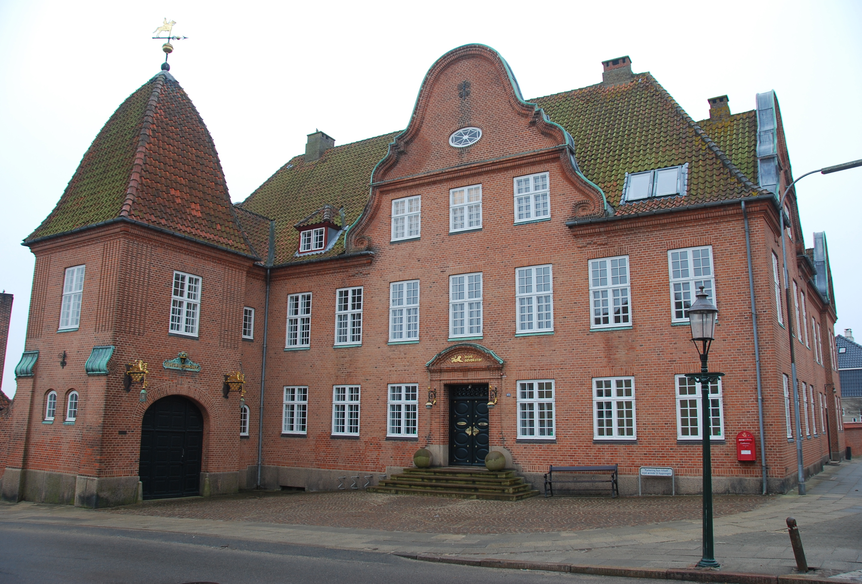 Den fredede bygning "Generalkommandoen" i Viborg.